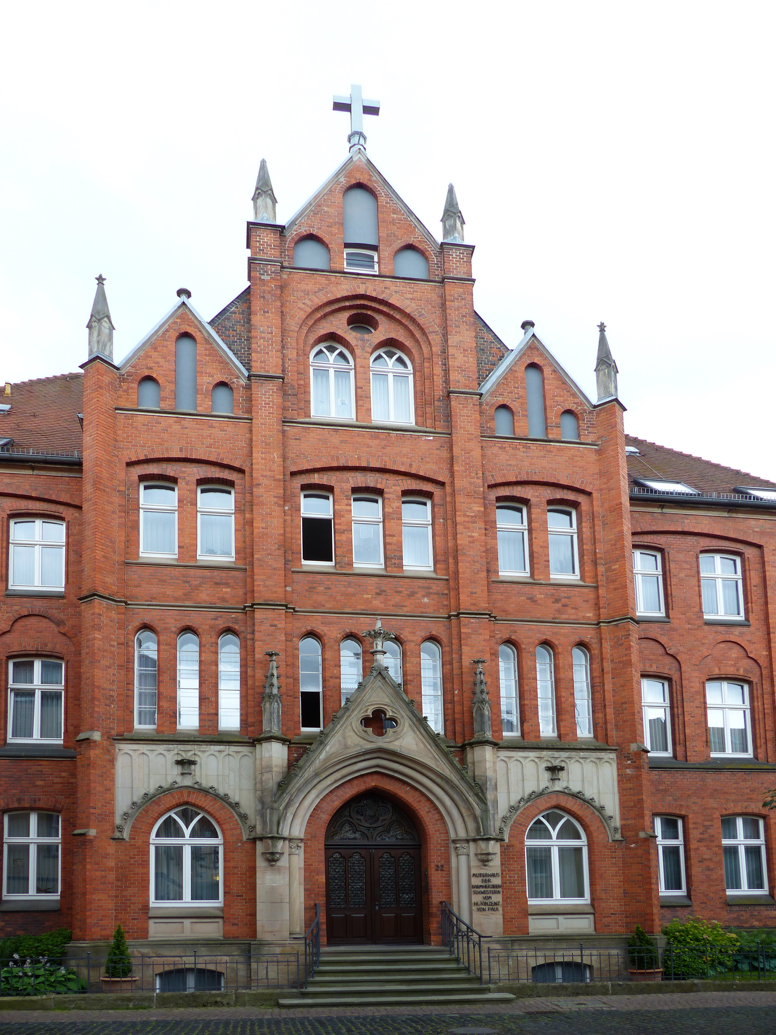 Kanalstraße 22-24, Fulda